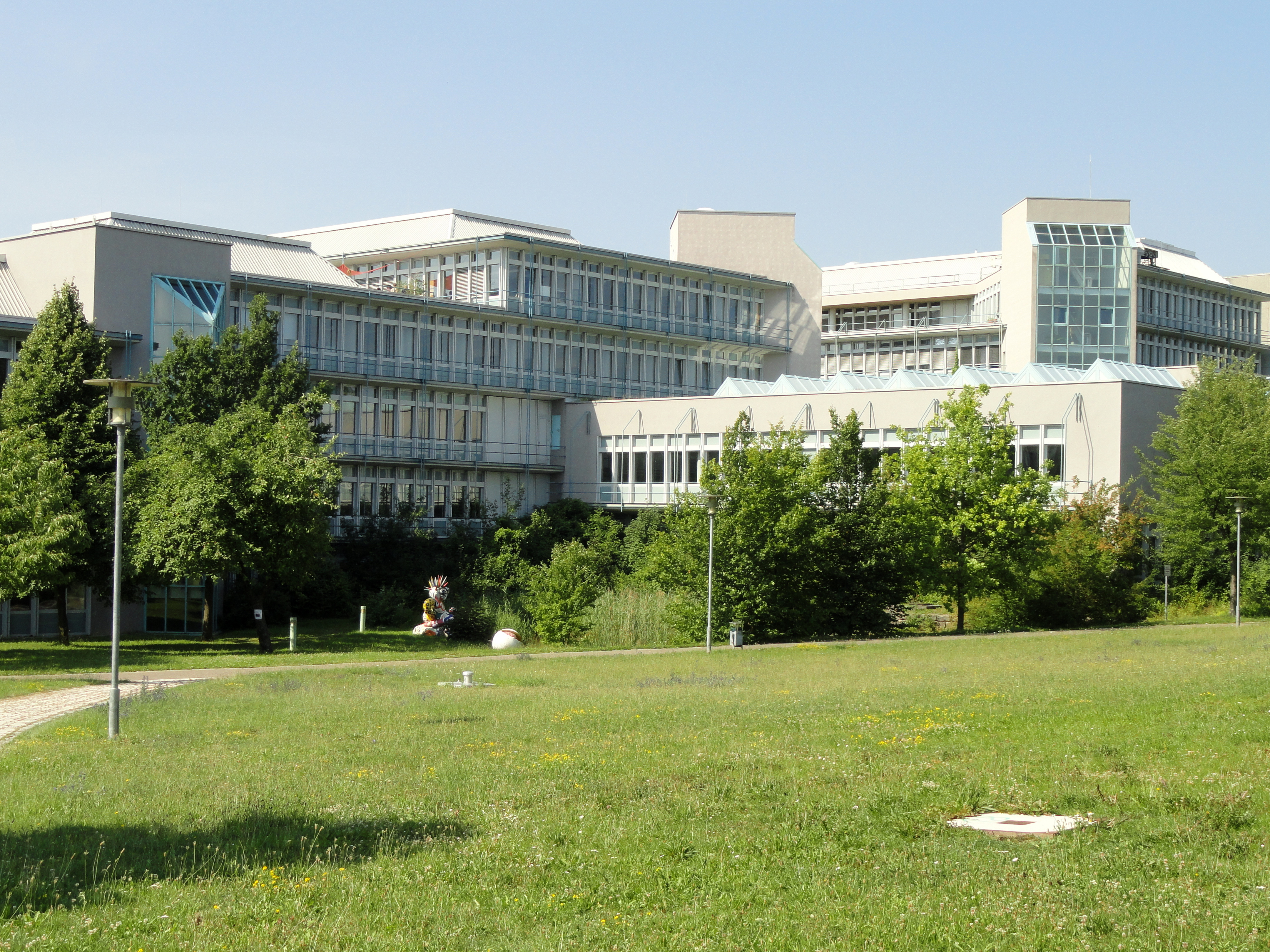 View of Hubland Campus, Julius-Maximilians-Universität Würzburg, Würzburg, Germany.